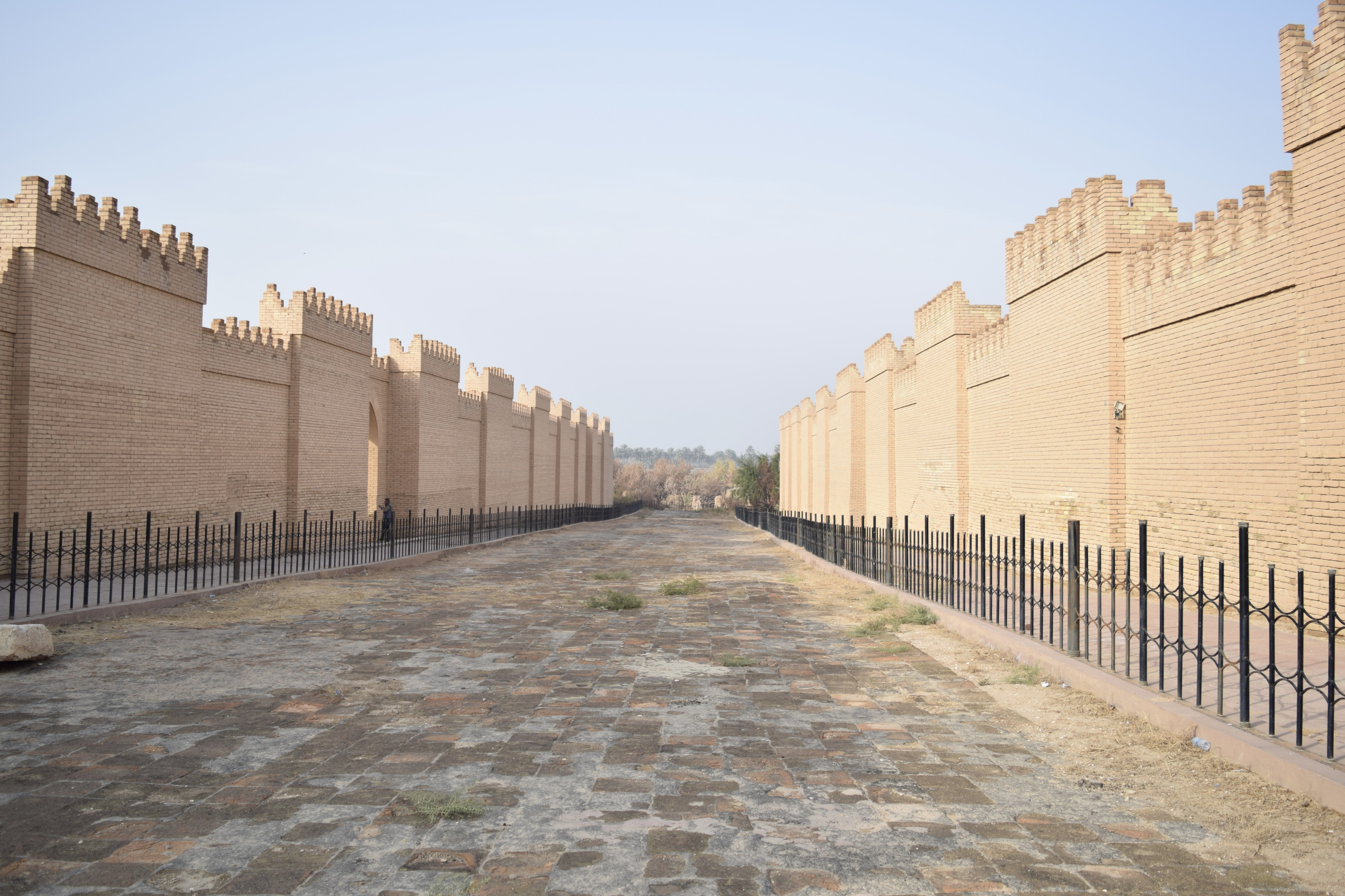 شارع الموكب في مدينة بابل الأثرية.